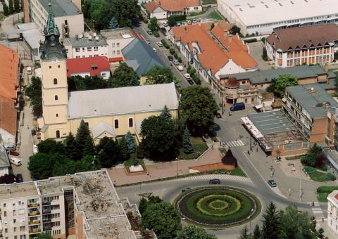 Hajdúnánás, Hungary, aerialphotography